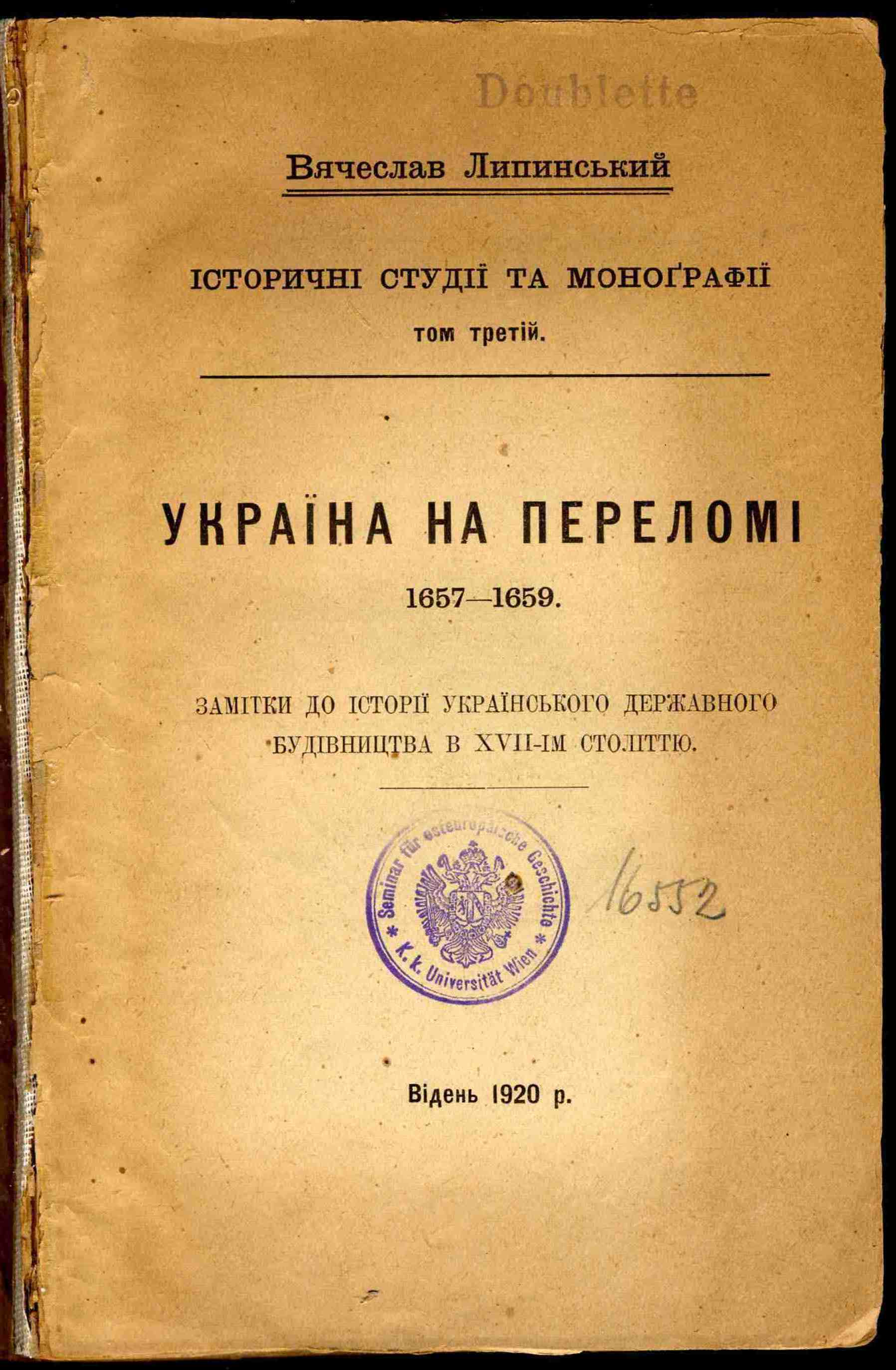 Файл наданий Затурцівським меморіальним музеєм В'ячеслава Липинського